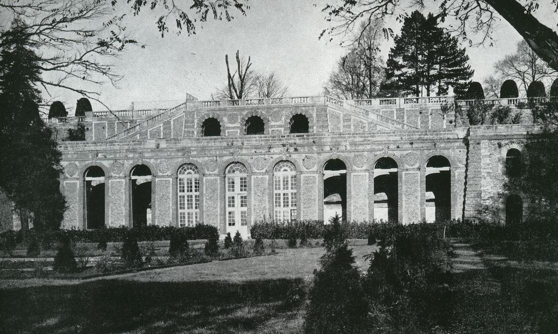 Photographie de l'Orangerie de Meudon, première moitié du XXe siècle. Musée d'Art et d'Histoire de Meudon.